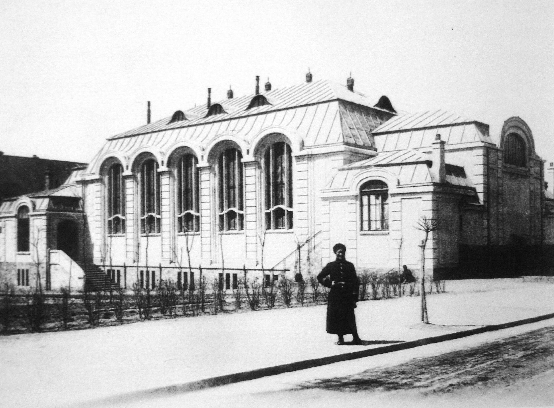 青岛海因里希亲王饭店音乐厅